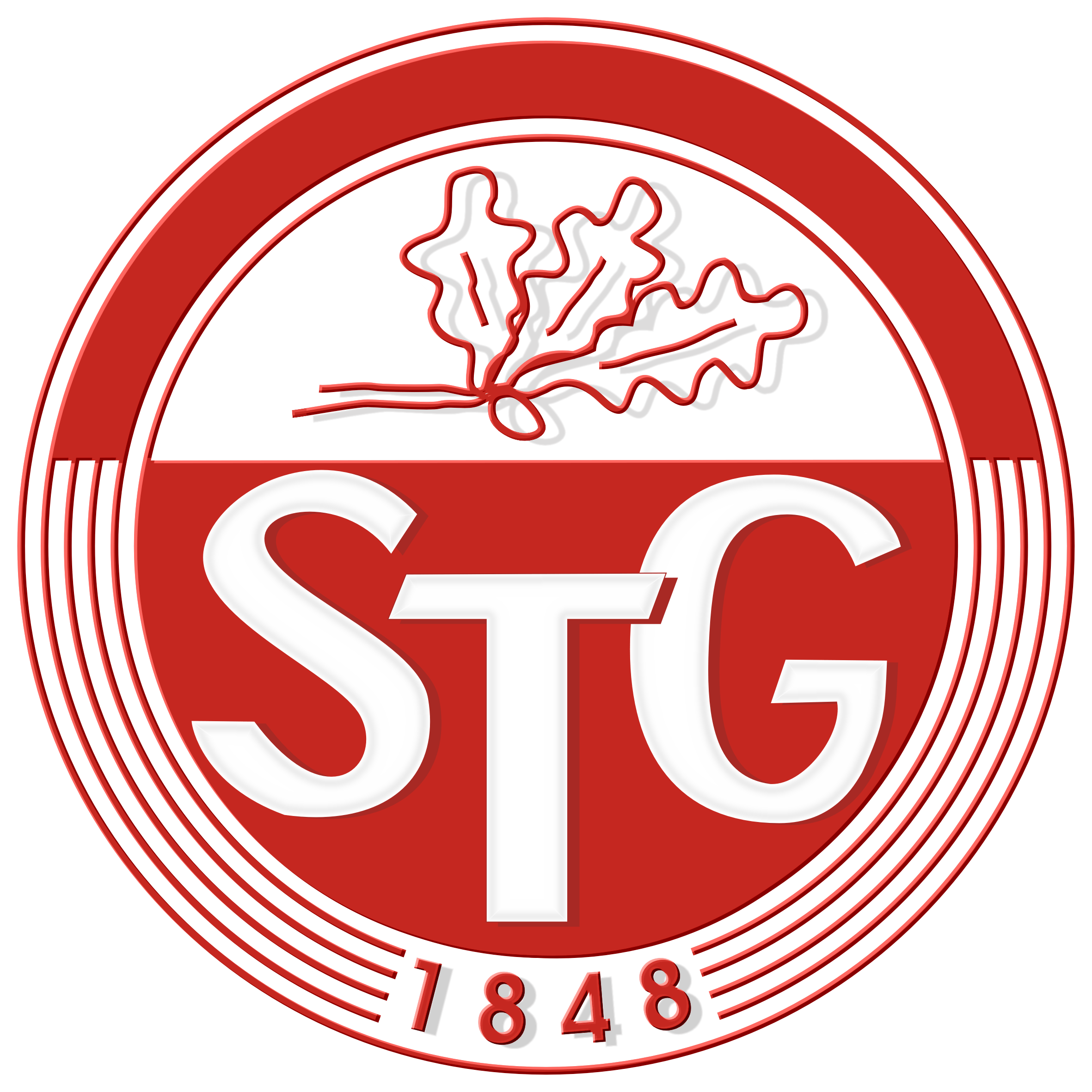 Vereinslogo der Sprendlinger Turngemeinde 1848 e.V.